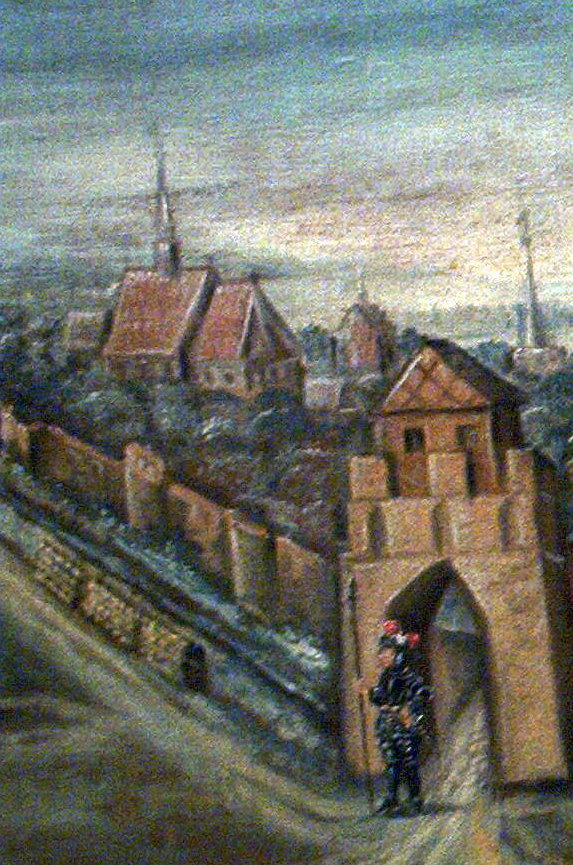 Ausschnitt mit der Klosterkirche Sankt Trinitatis aus dem Gemälde "Prospectus Ruppinensis ac Wuthenowiensis" (1694)